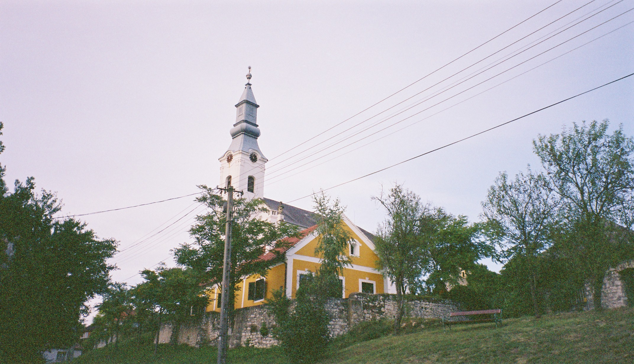 a református templom képe vásártér felöl, Köveskál